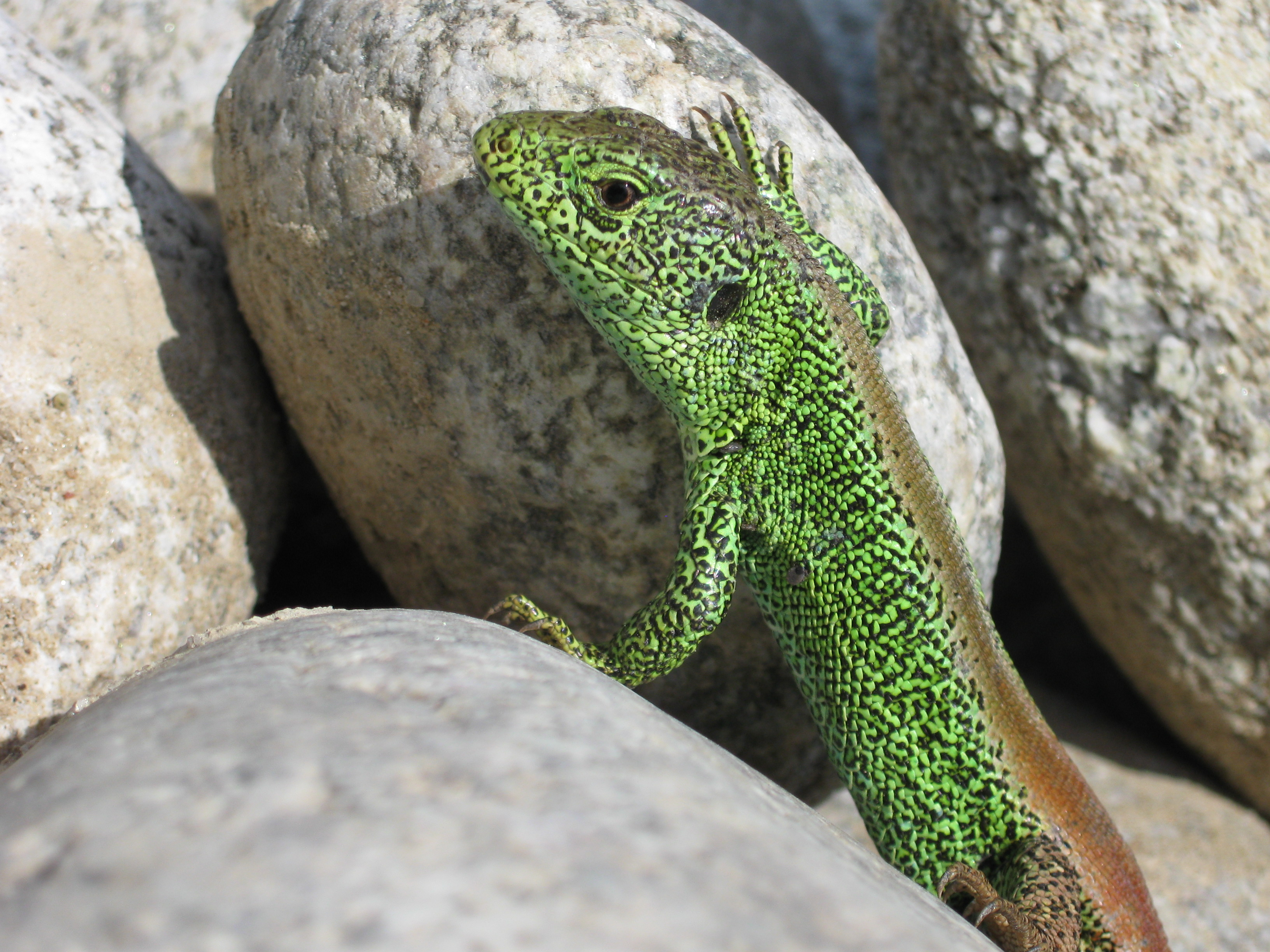 Lacerta agilis